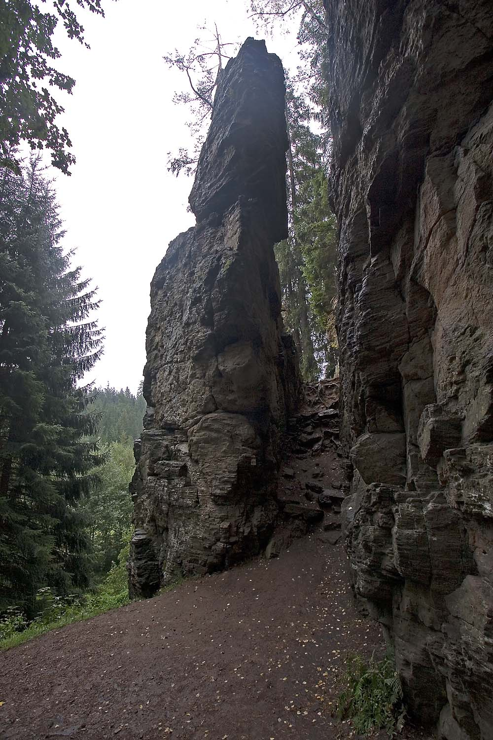 Přírodní památka Rozštípená skála v okrese Žďár nad Sázavou